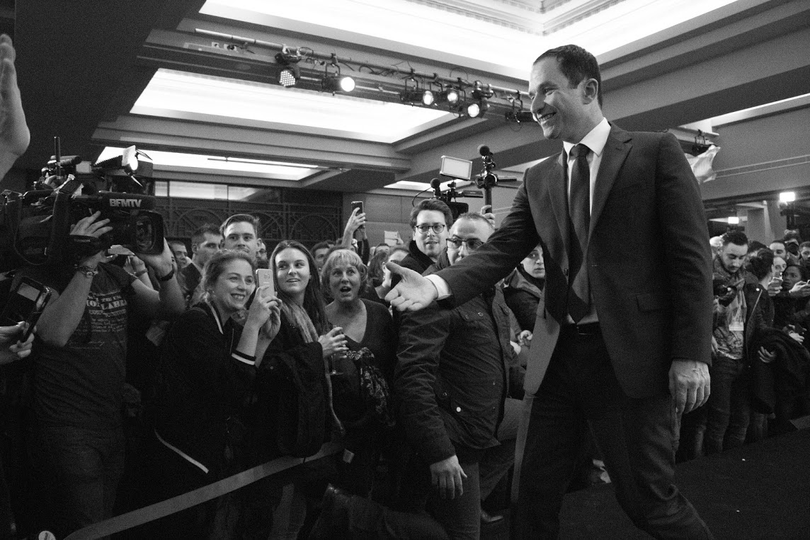 Benoit Hamon à tribune de la Maison de la Mutualité le soir de sa victoire au second tour des primaires.